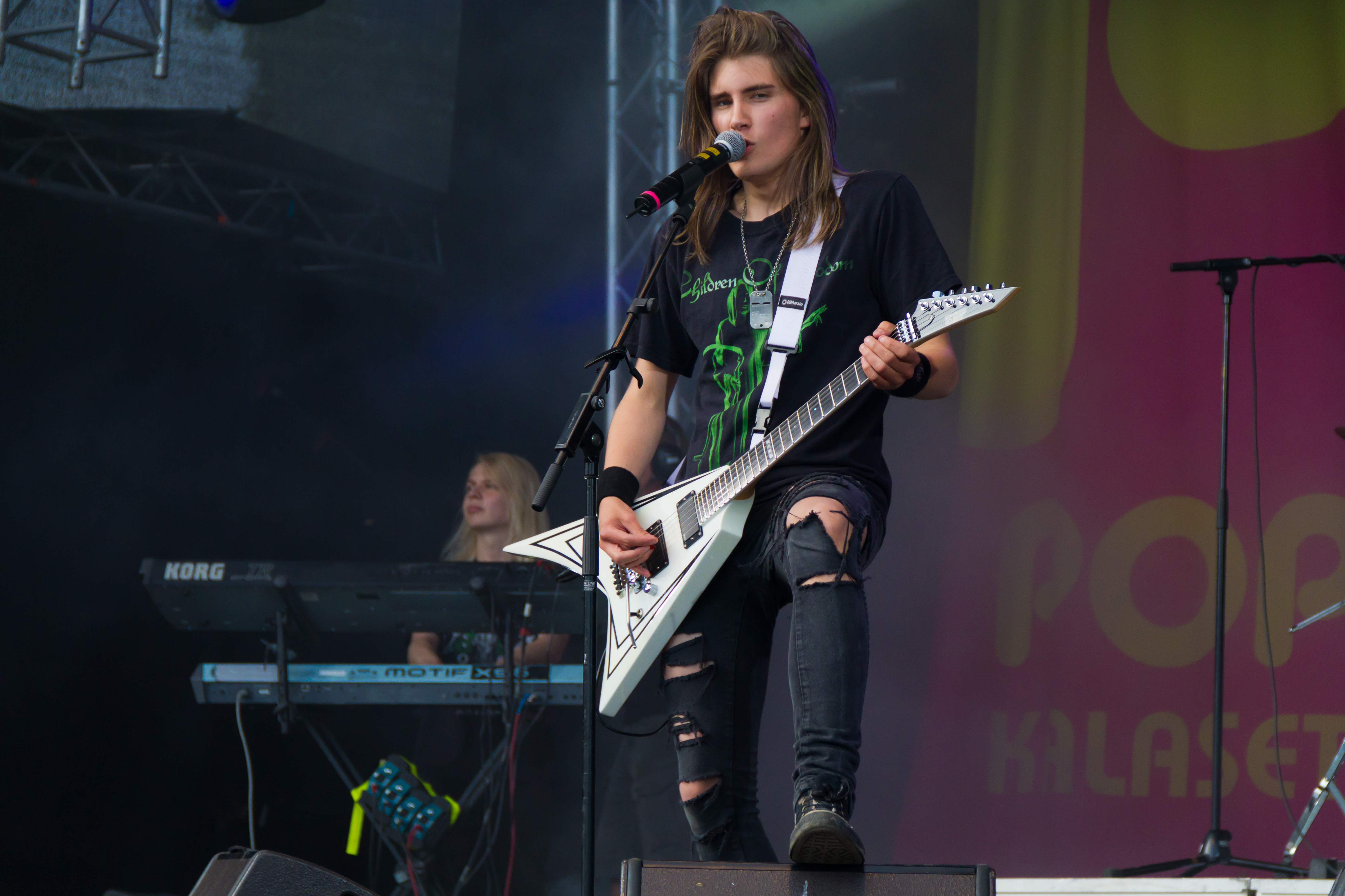 Sturm und Drang esiintymässä vuonna 2011 Popkalaset-tapahtumassa Tammisaaressa. Etualalla yhtyeen laulaja André Linman. Takana kosketinsoittaja Jeppe Welroos.